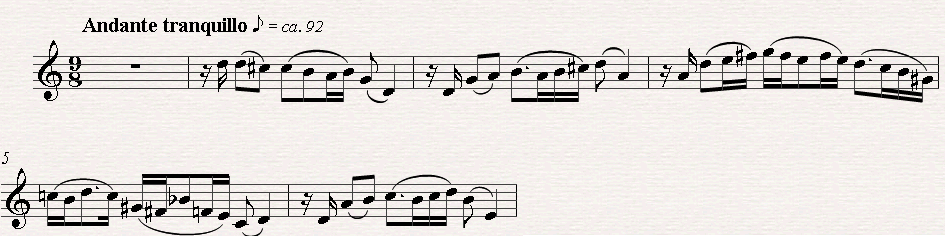 Bartók: II. hegedűverseny, II. tétel téma